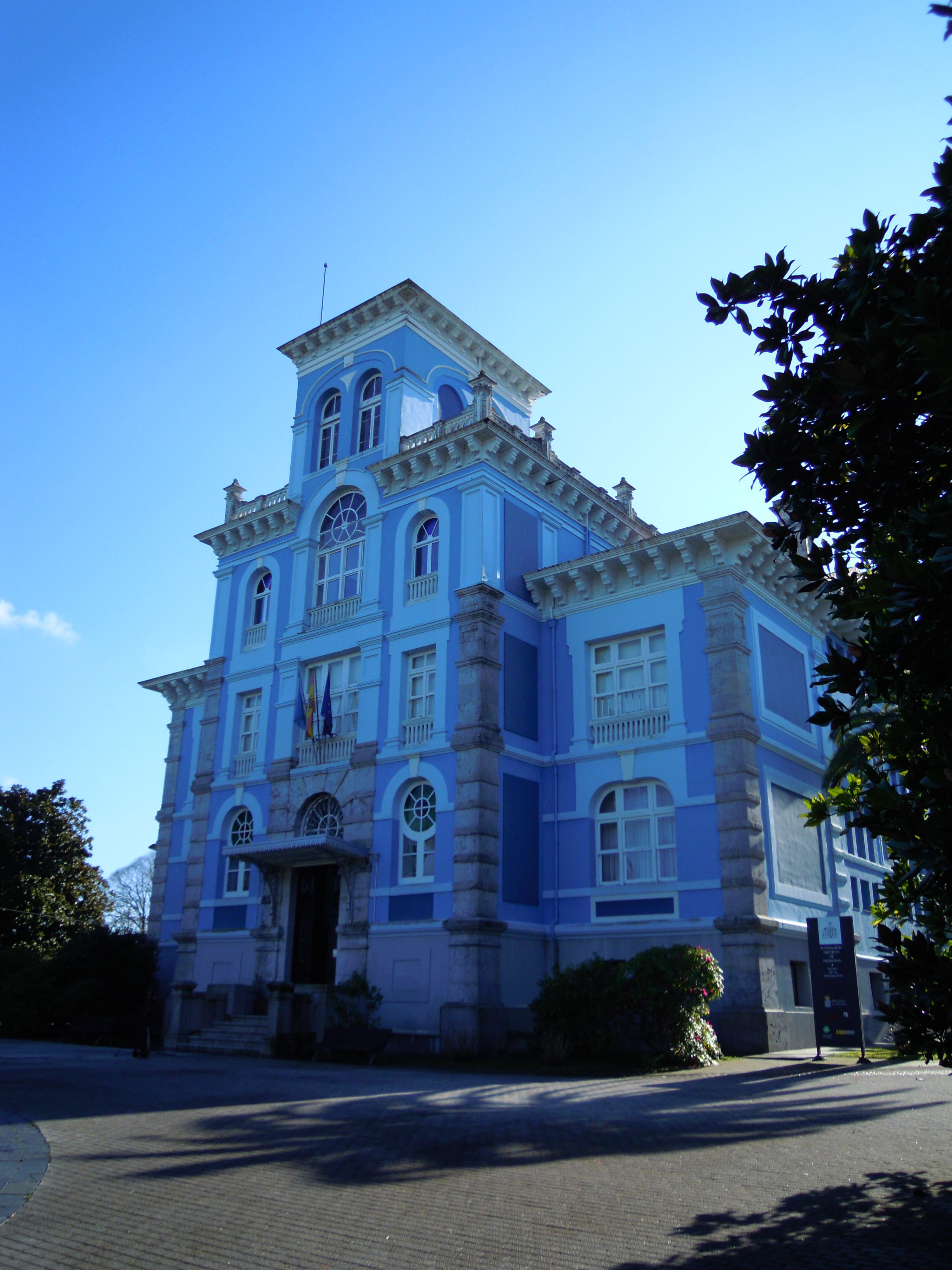 Archivu d'indianos